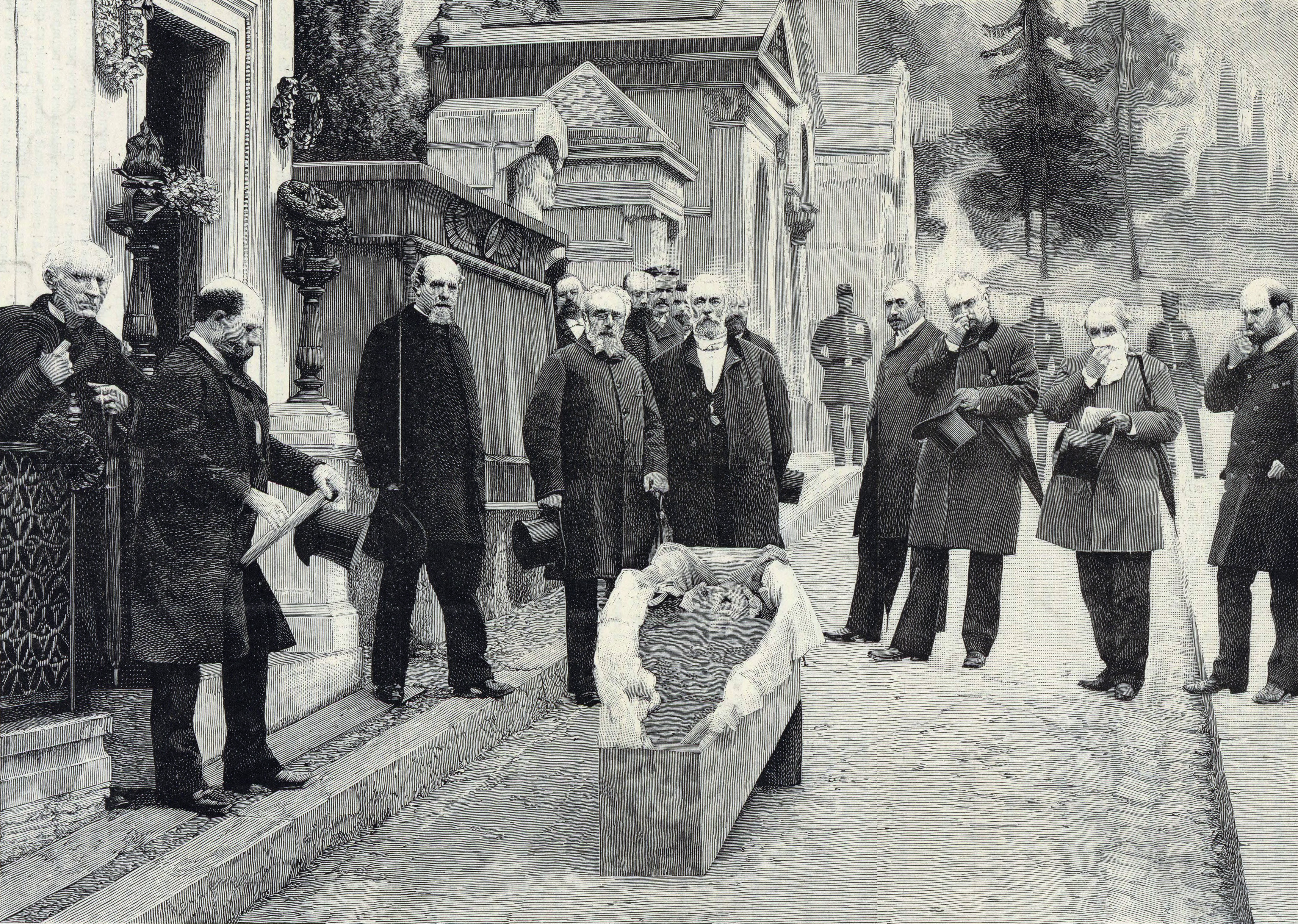 Exhumation des restes de Rossini au Père-Lachaise : la reconnaissance du corps. Gravure d'après une photographie de Pierre Petit.